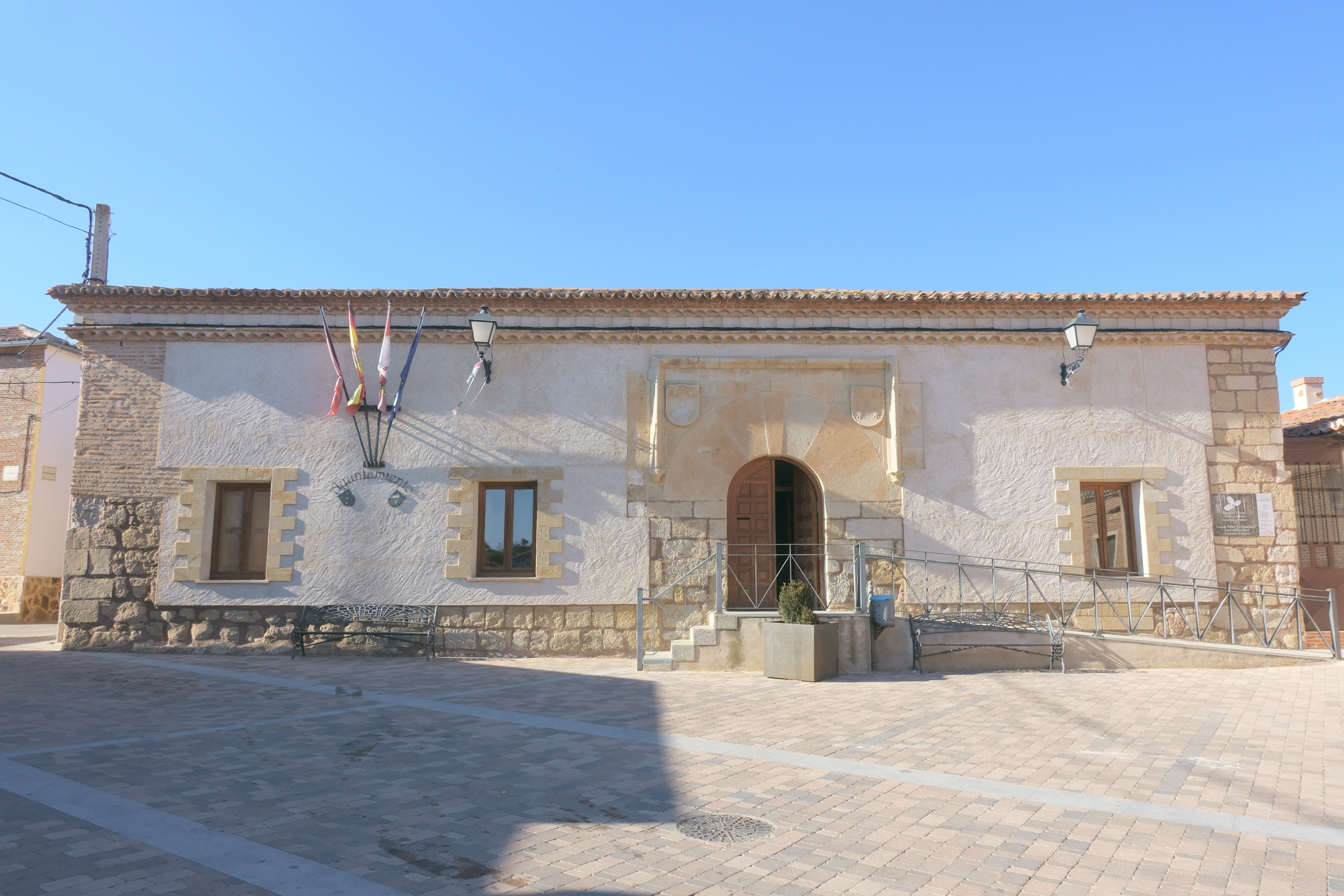 Casa consistorial de Guarrate (Zamora, España).